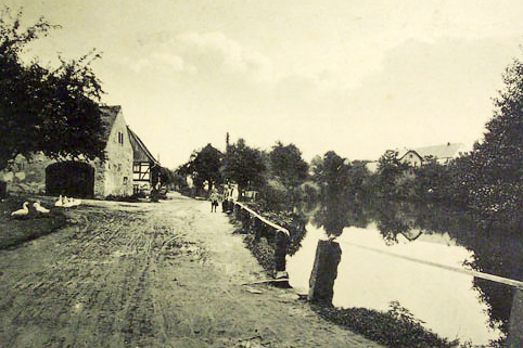 Alte Dorfansicht